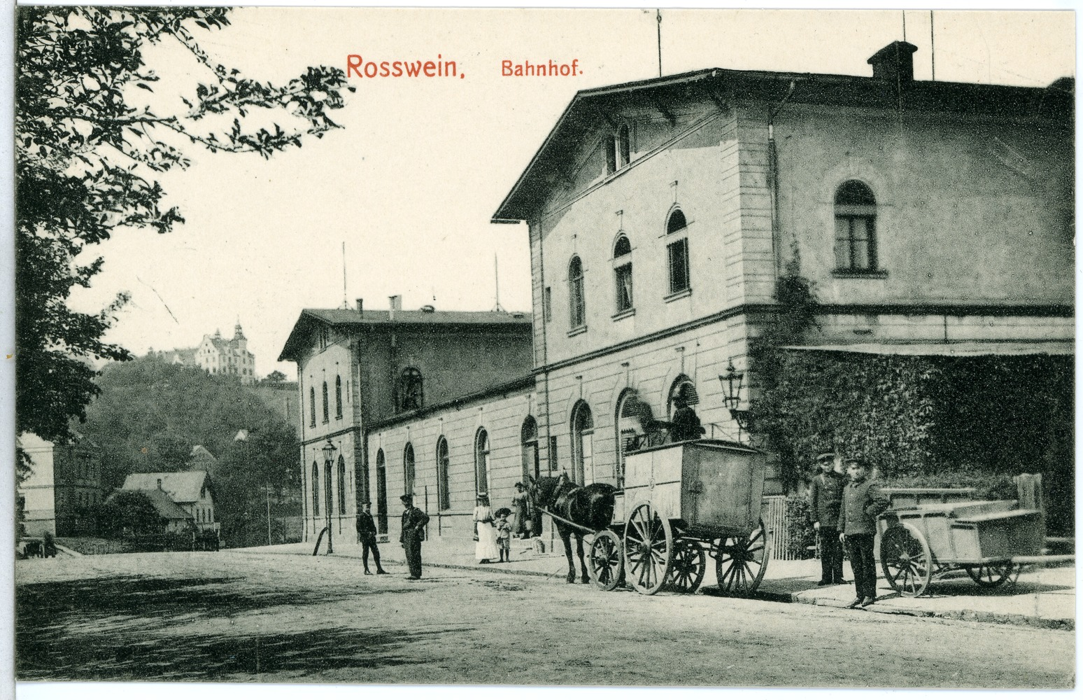 Roßwein; Bahnhof This postcard is from publisher Brück & Sohn in Meißen ( postcard has a unique number 10113 and is available in a higher resolution at the publisher. This images was uploaded in a cooperation project between Wikipedians and the publisher.